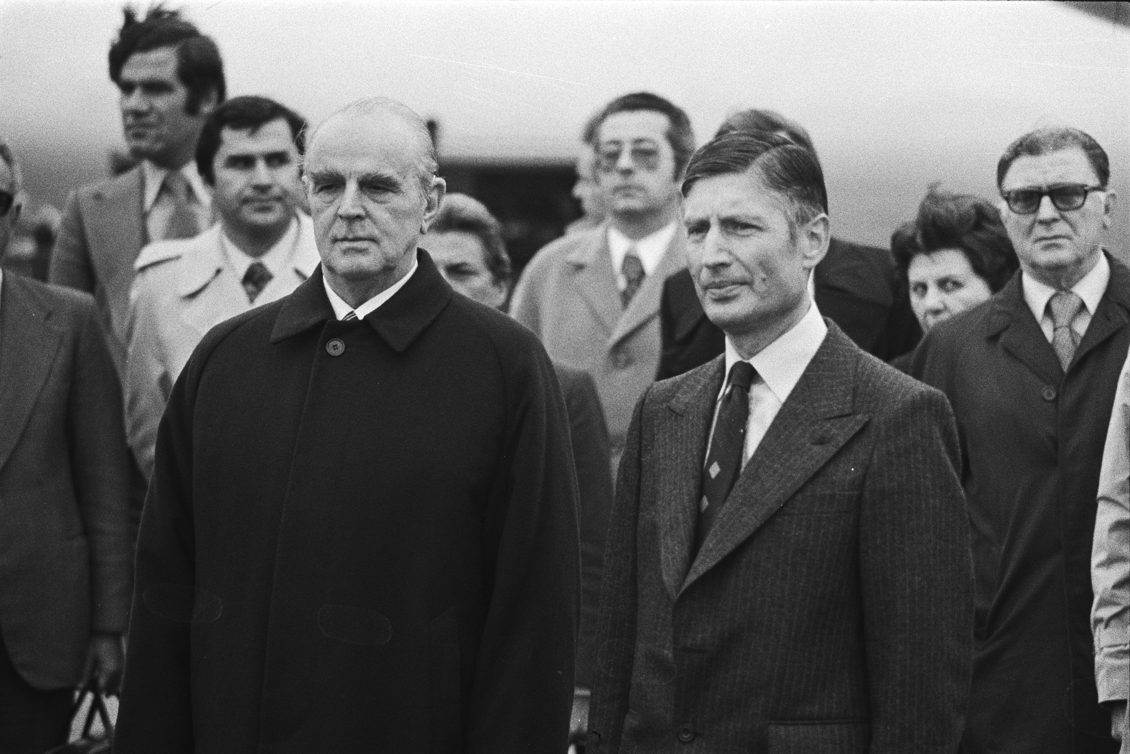 Collectie / Archief : Fotocollectie Anefo Reportage / Serie : [ onbekend ] Beschrijving : Bezoek premier Karamanlis van Griekenland; Van Agt in gesprek met Karamanlis Datum : 5 april 1978 Locatie : Griekenland Trefwoorden : GESPREKKEN, bezoeken, premiers Persoonsnaam : Karamanlis Fotograaf : Verhoeff, Bert / Anefo Auteursrechthebbende : Nationaal Archief Materiaalsoort : Negatief (zwart/wit) Nummer archiefinventaris : bekijk toegang 2.24.01.05 Bestanddeelnummer : 929-6548